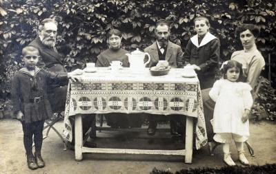 פינס חופשה משפחתית